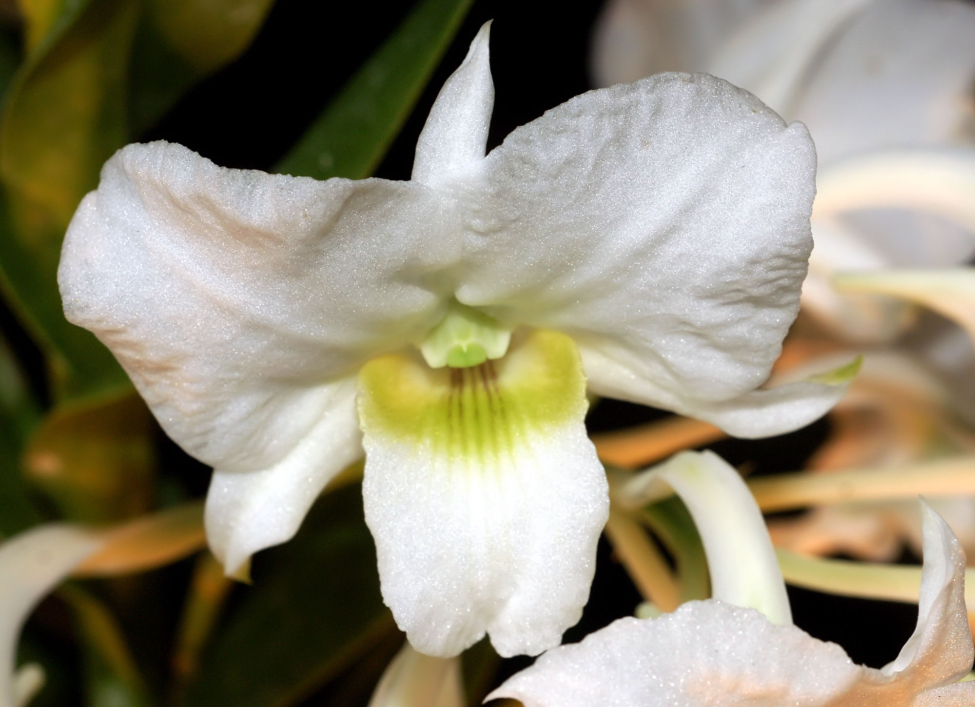 Dendrobium dearei